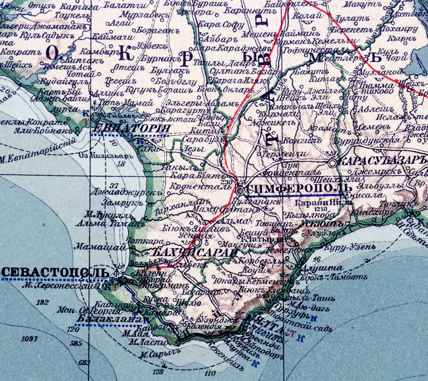 Карта Симферопольского уезда по состоянию на 1903 год.